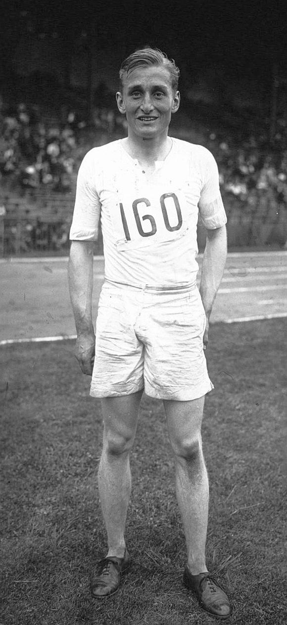 Colombes : meeting des Champions : Lord Burghley, gagnant du 400 m. haies (portrait) : [photographie de presse] / Agence Meurisse